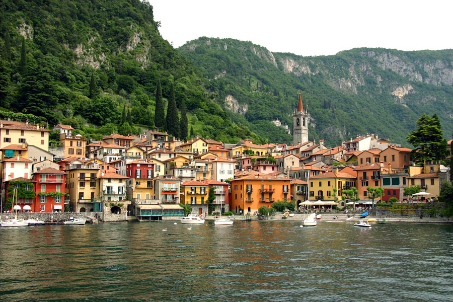 Veduta del borgo di Varenna (LC) sulla sponda lecchese del Lario